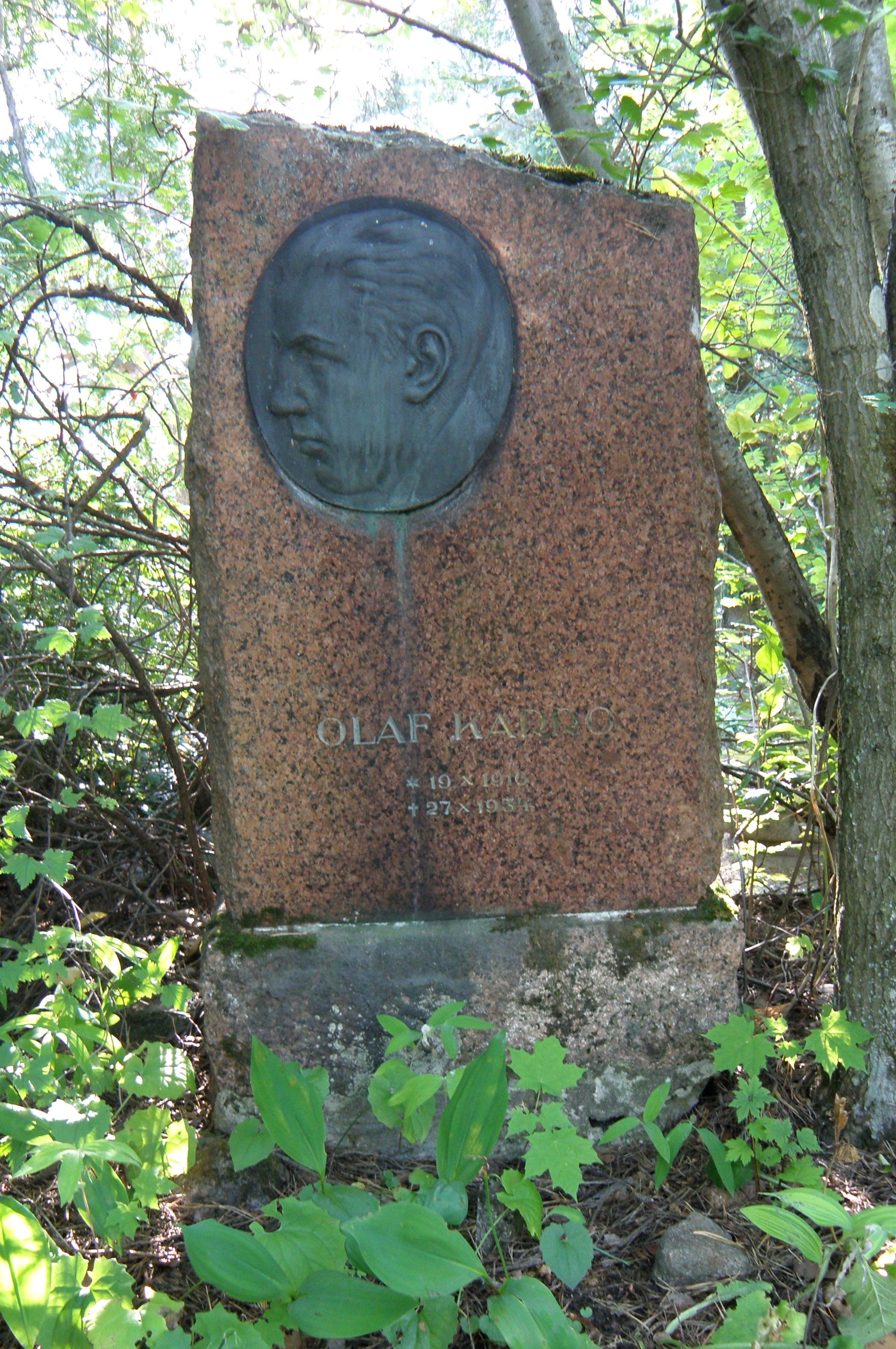 Olaf Karro hauasammas